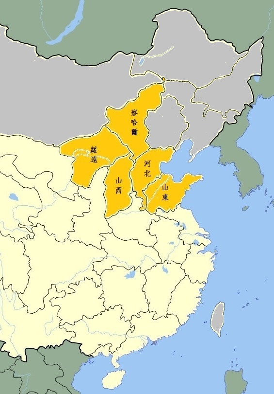 1935年，日本積極策劃華北五省「自治」運動，企圖使包括河北、察哈爾、綏遠、山東、山西在內之華北五省脫離中國，在關內製造第二個「滿洲國」，最後以國民政府設立冀察政務委員會（轄河北、察哈爾）而平息。